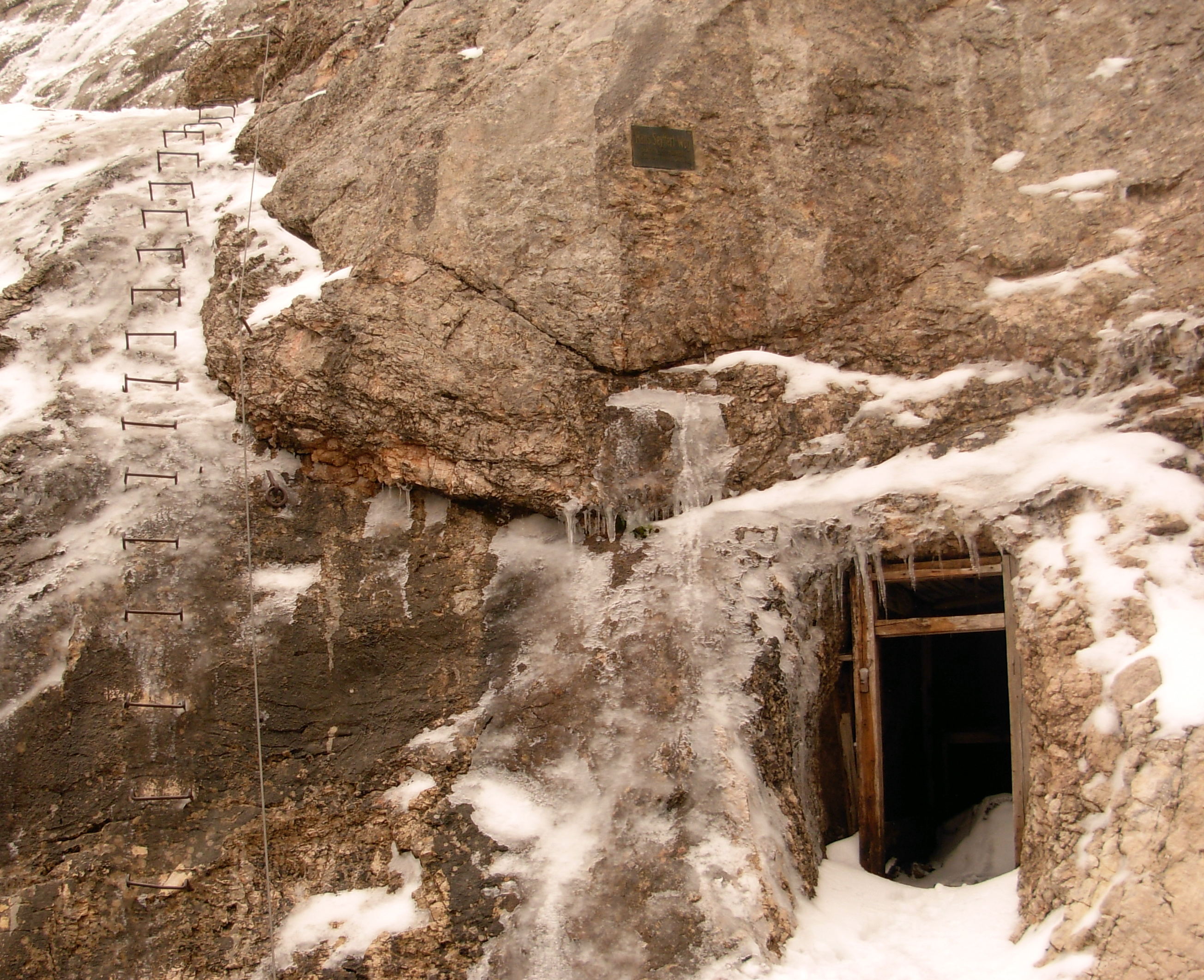 Remains from WW1 and Via Ferrata in Forcella dela Marmolada/Pirmojo pasaulinio karo laikų statiniai Marmolados šlaite, kairėje matoma laipiojimo trasa su įrengtais trosais ir laipteliais